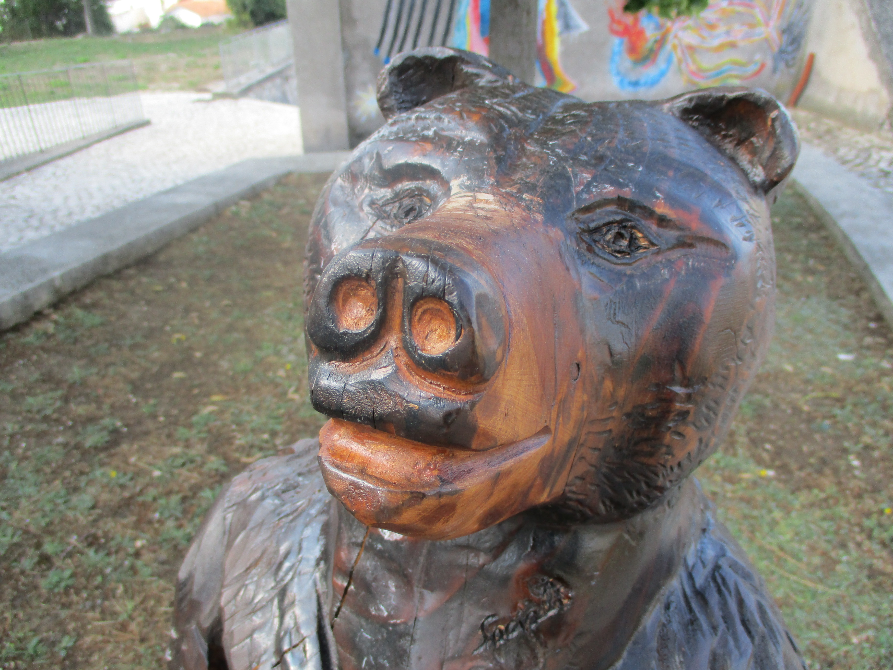 Scultura lignea dedicata all'orso marsicano Ruggero